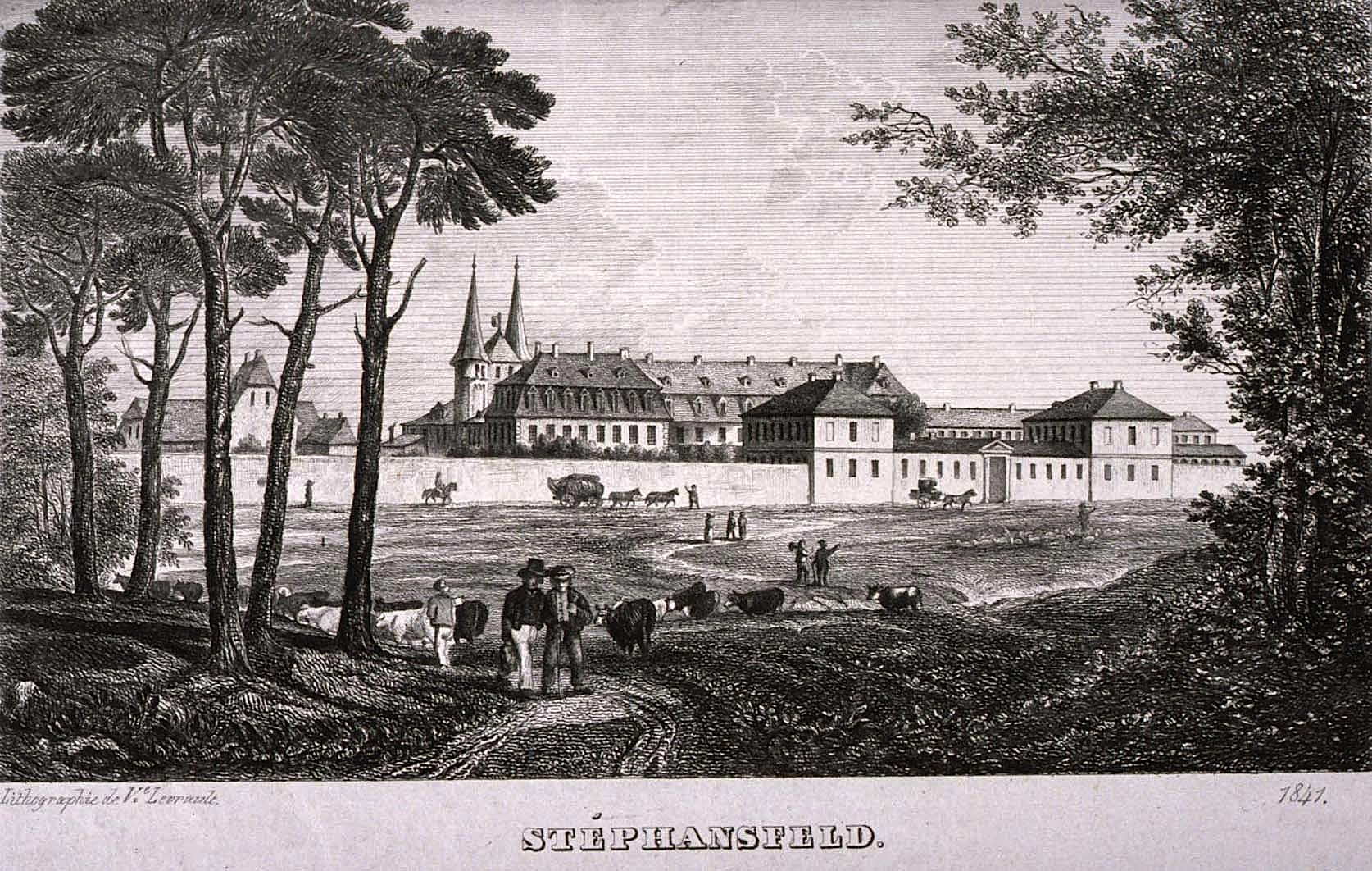 Brumath l'asile départemental d'aliénés de Stéphansfeld in Renseignements sur l'asile départemental d'aliénés de Stéphansfeld (Bas-Rhin) de David Richard. - Strasbourg : Vve Berger-Levrault, 1841, (pl. 1)